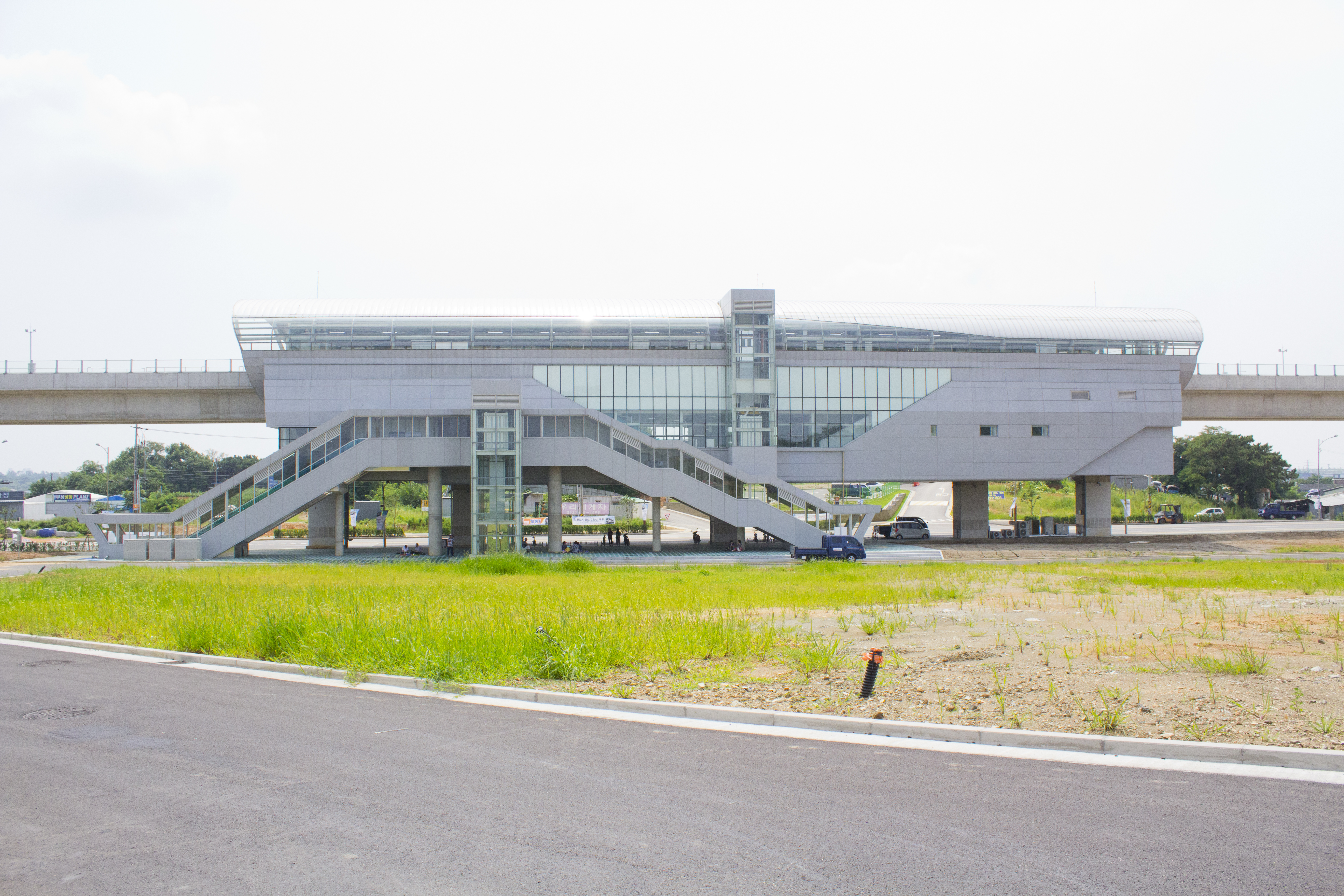 검단오류역 역사 외부 전경